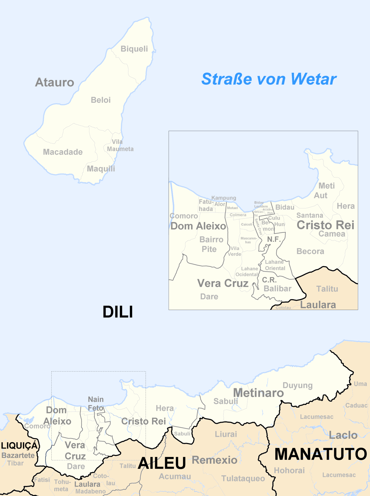 Sucos des Distrikts Dili/Osttimor nach der Neustrukturierung 2004